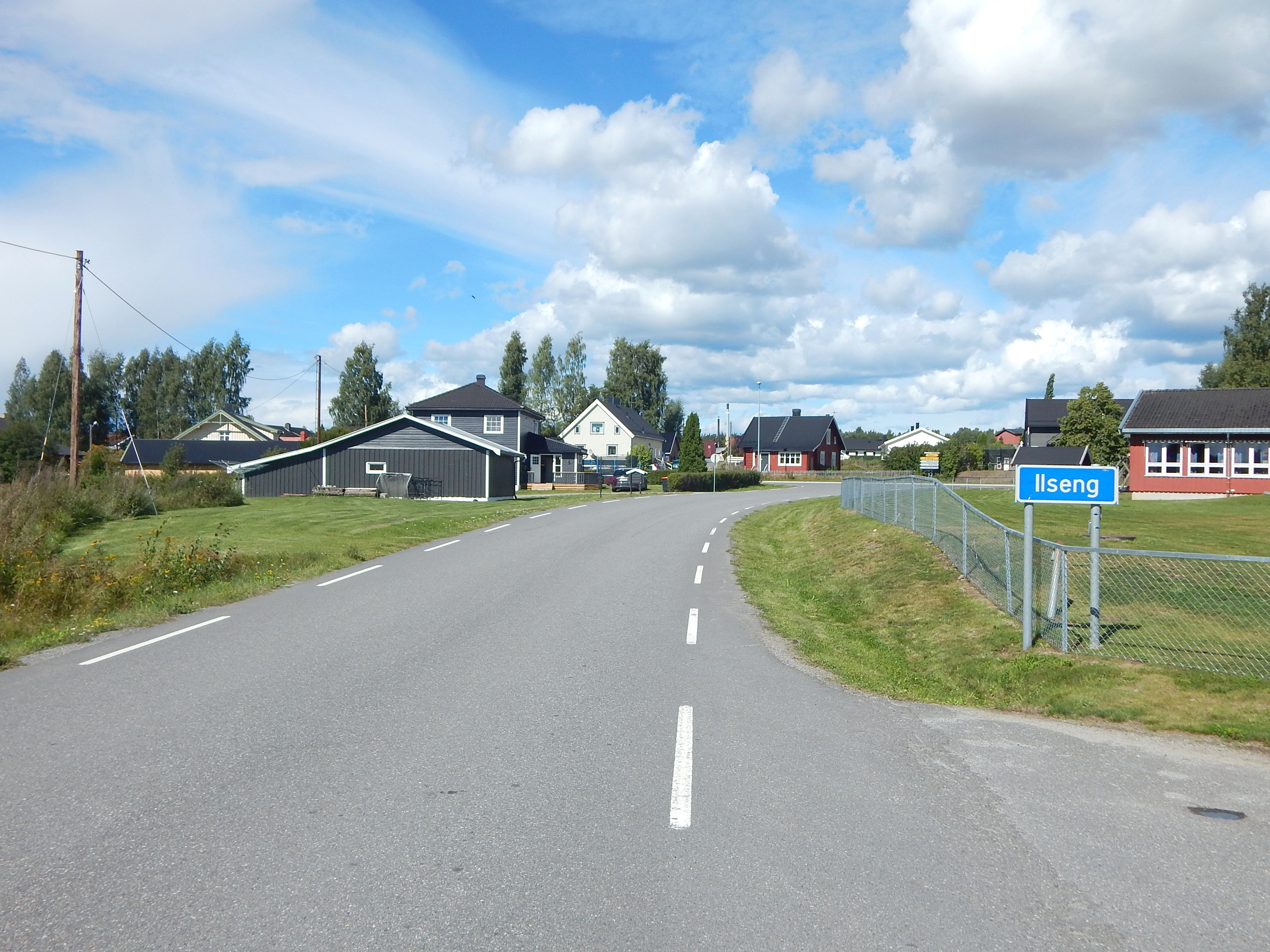 Løkenvegen (fylkesvei 1912, tidl. 237) på Ilseng, med Breidablikk skole til høyre